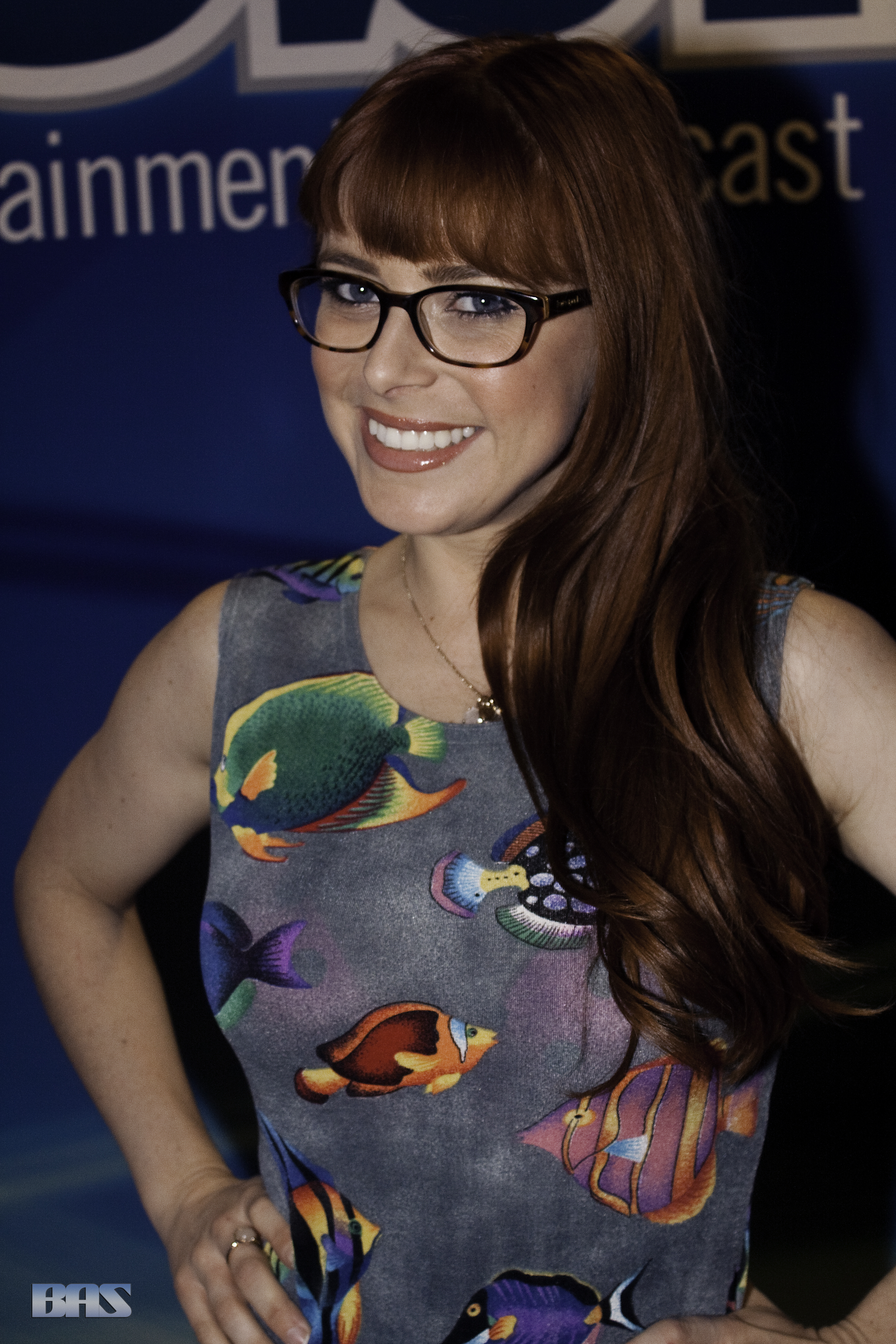 AEE16_0502bas